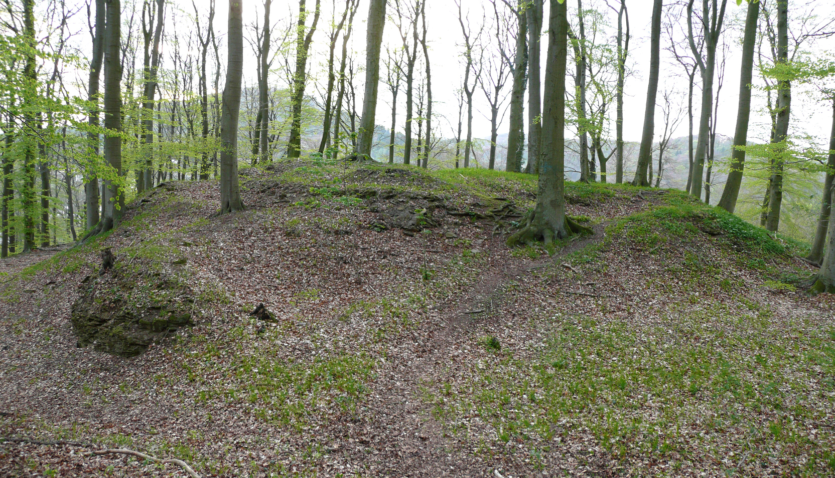 Burgplateau der Burg Roden